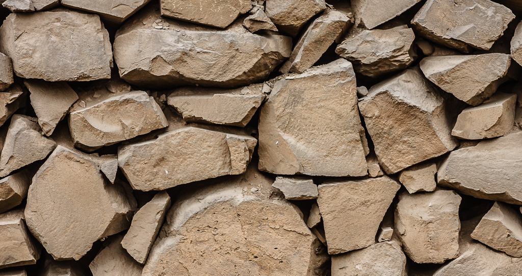 Muro de piedra